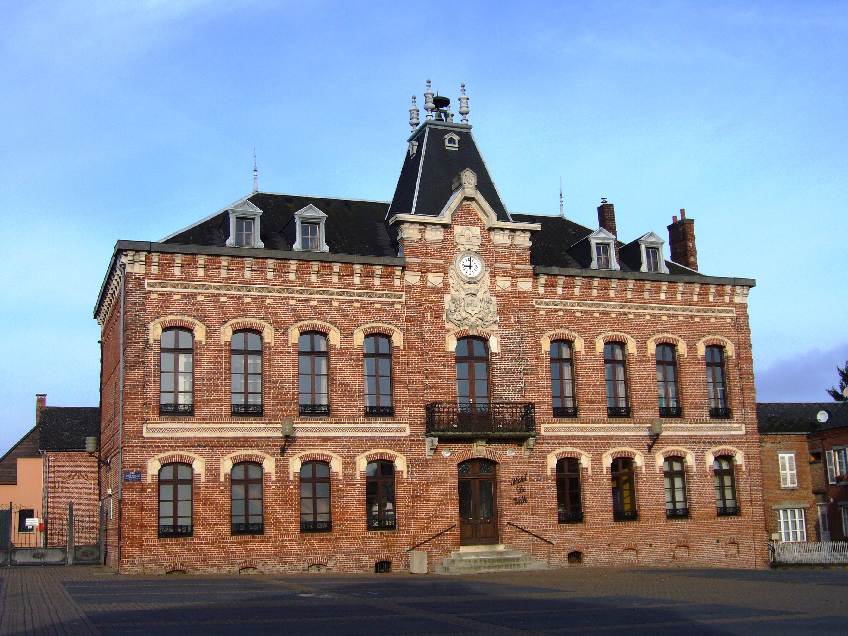 La Mairie d'Origny en Thiérache